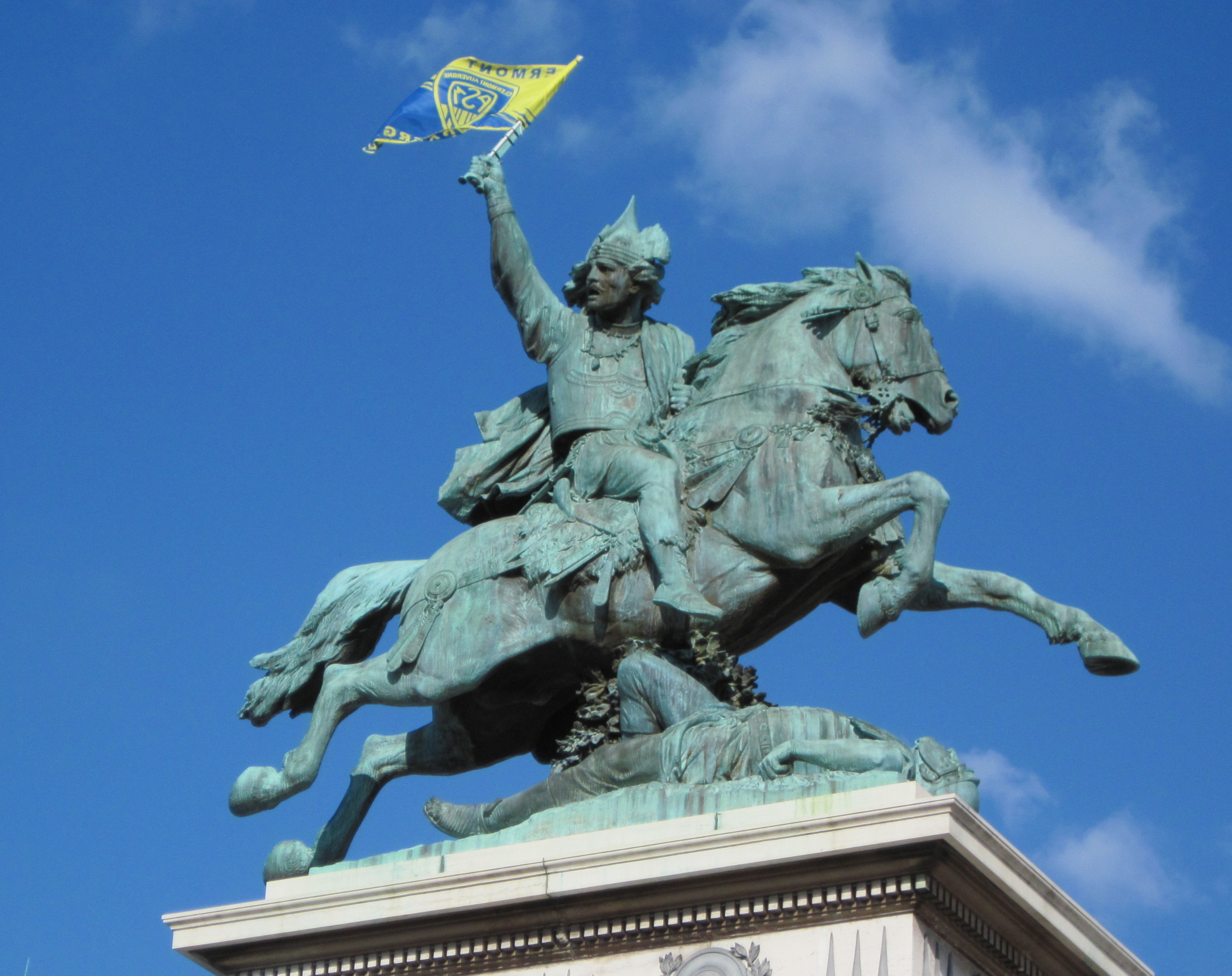 Statue de Vercingétorix (œuvre de Bartholdi) arborant le drapeau de ASM Clermont-Auvergne après leur championnat de 2010.